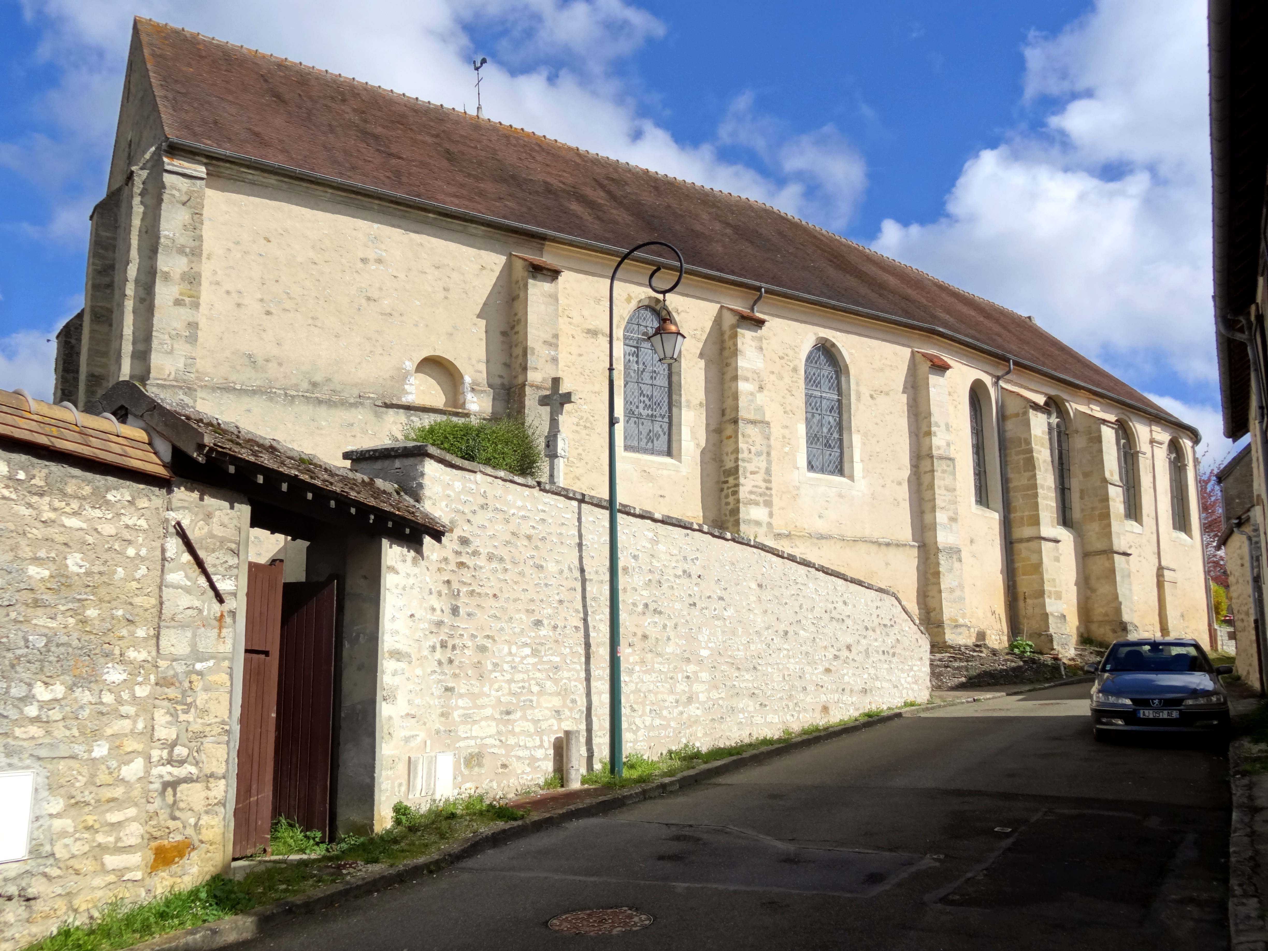 Église Saint-Martin de Follainville - voir titre.